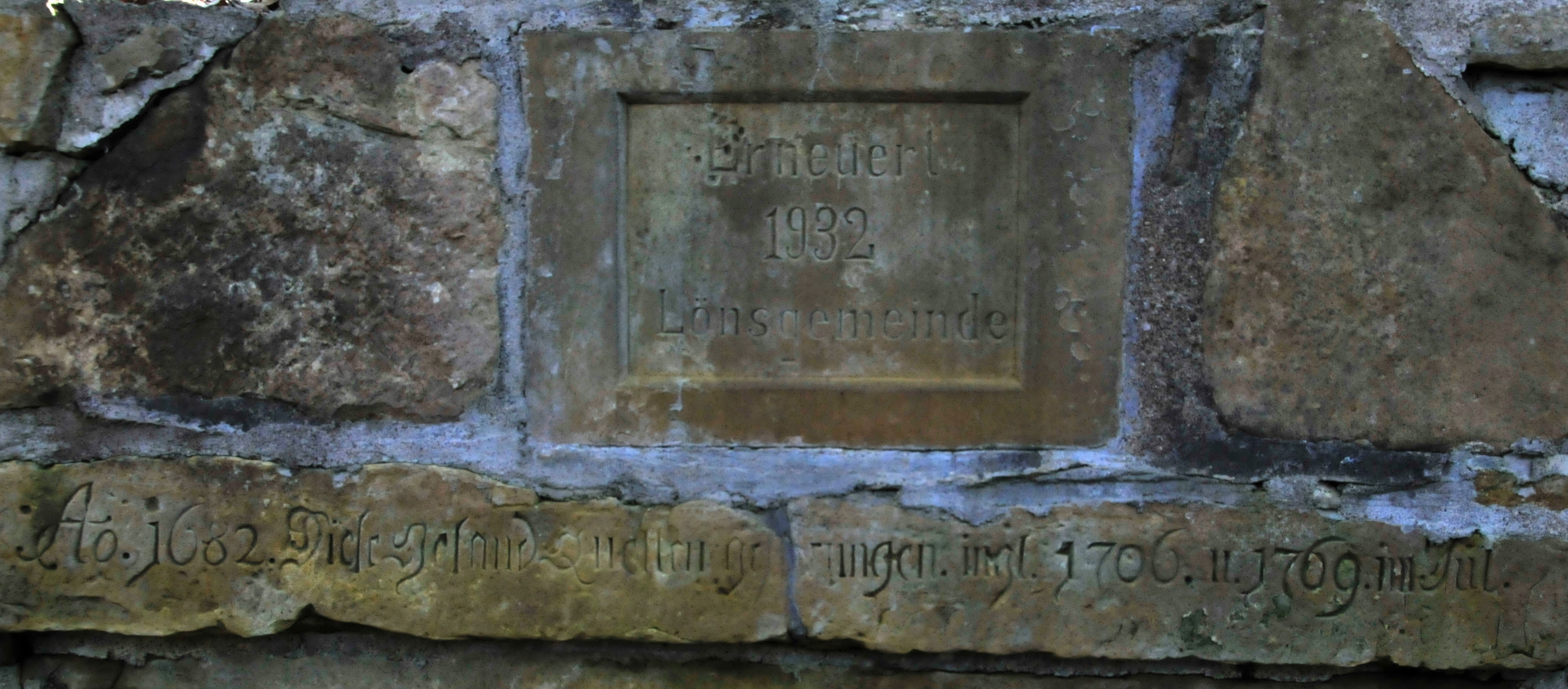 Gesundbrunnen am Seeberg (Gotha)